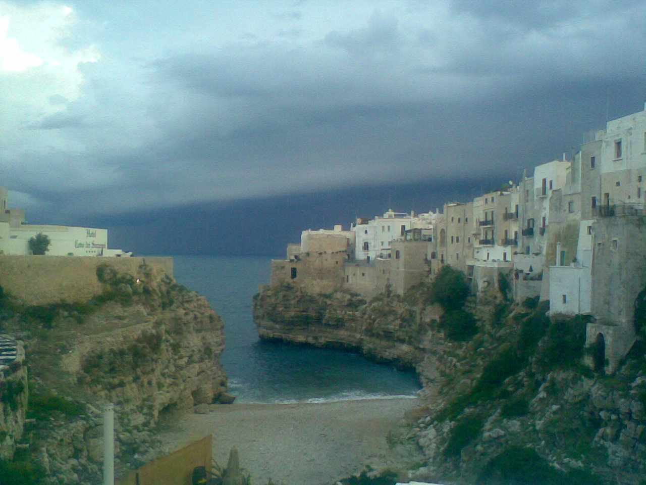 Polignano lama monachile lato mare